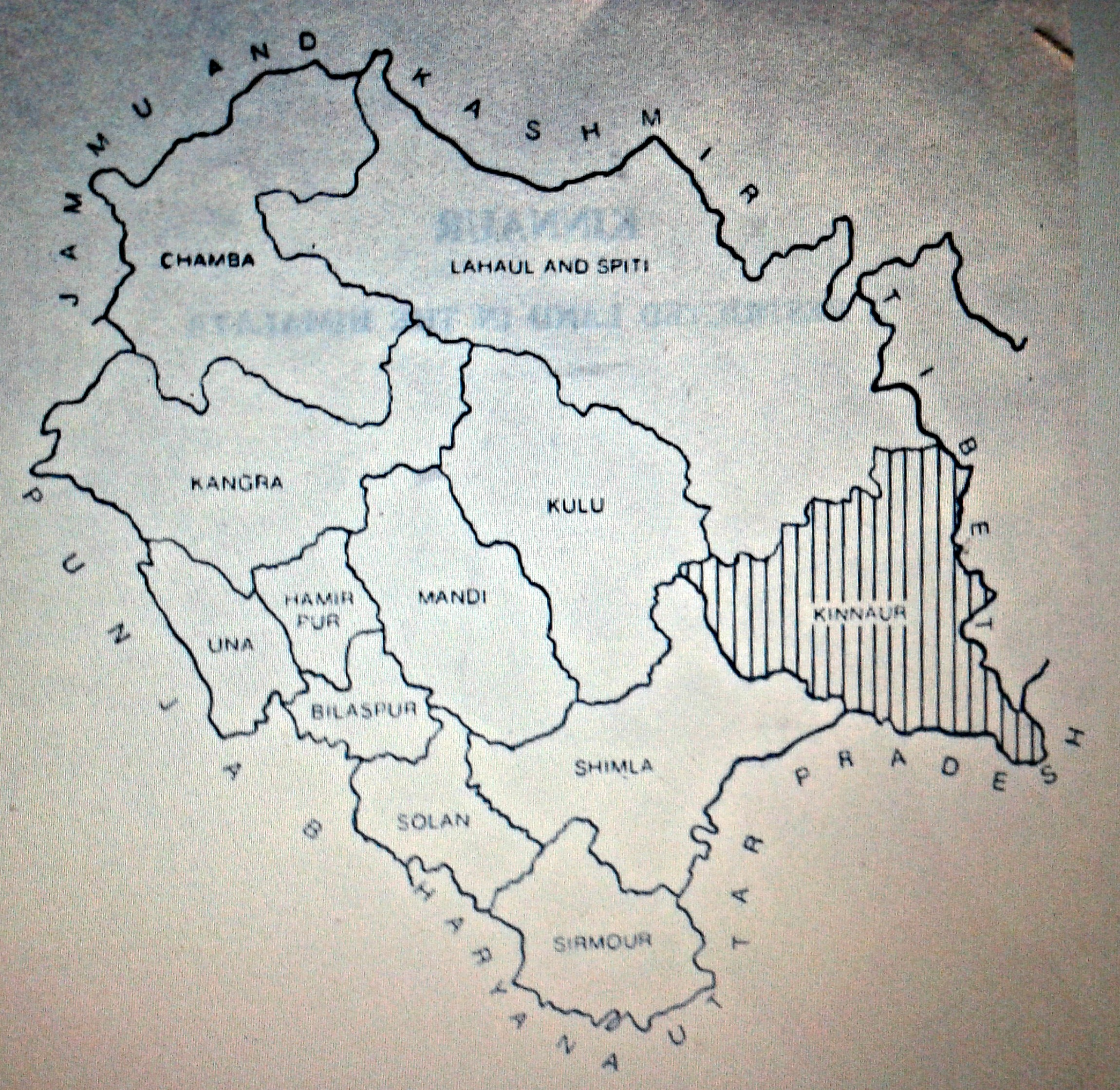 हिमाचल प्रदेश का नक्शा